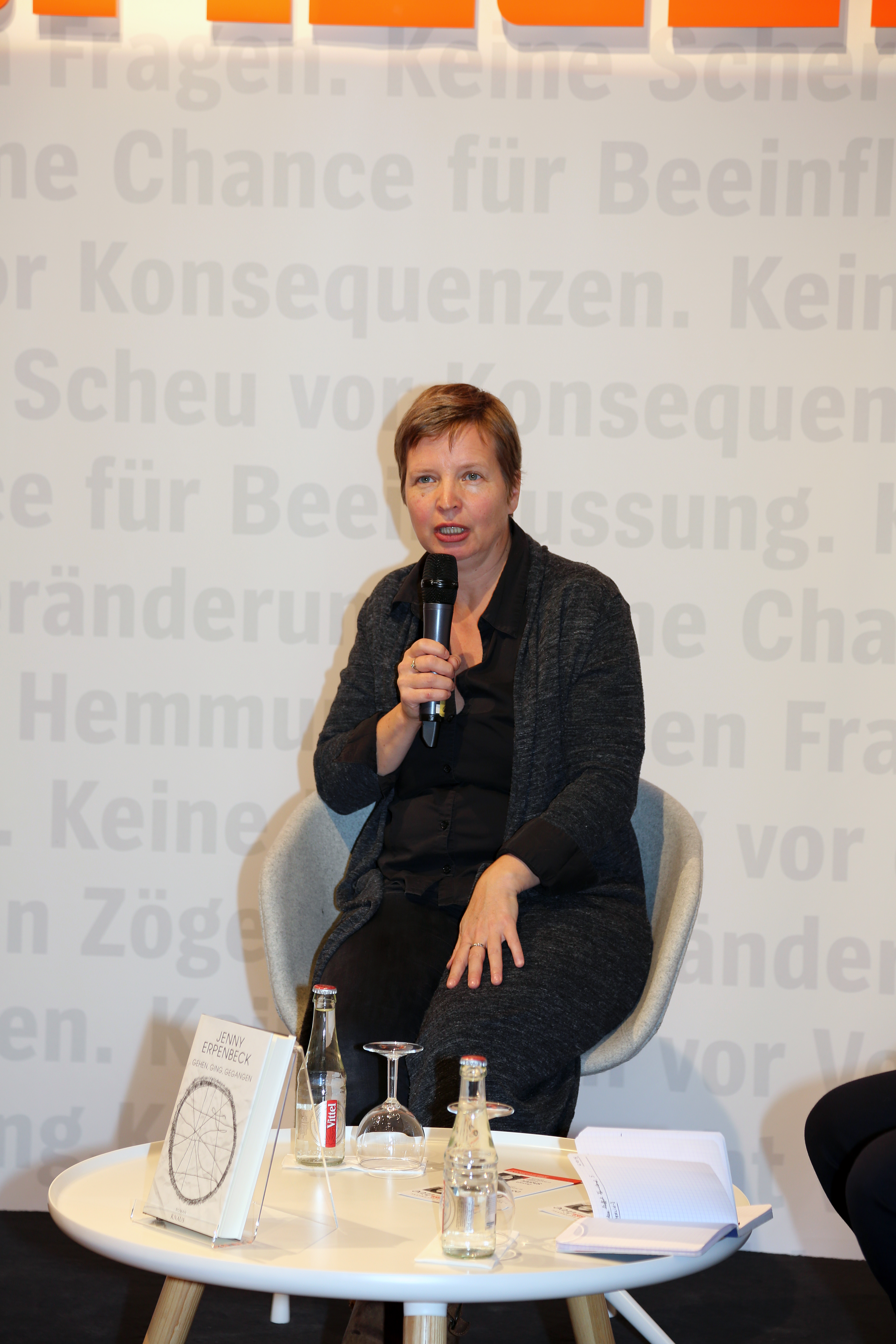 Jenny Erpenbeck auf der Frankfurter Buchmesse 2015